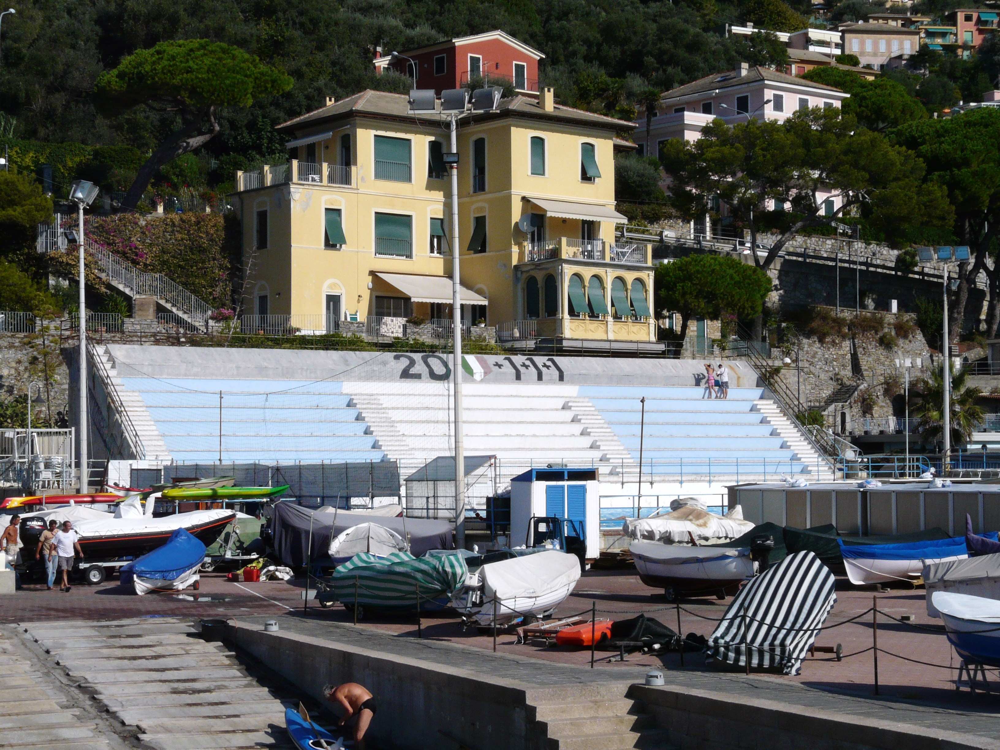 Vasca esterna della Pro Recco, Recco, Liguria, Italia